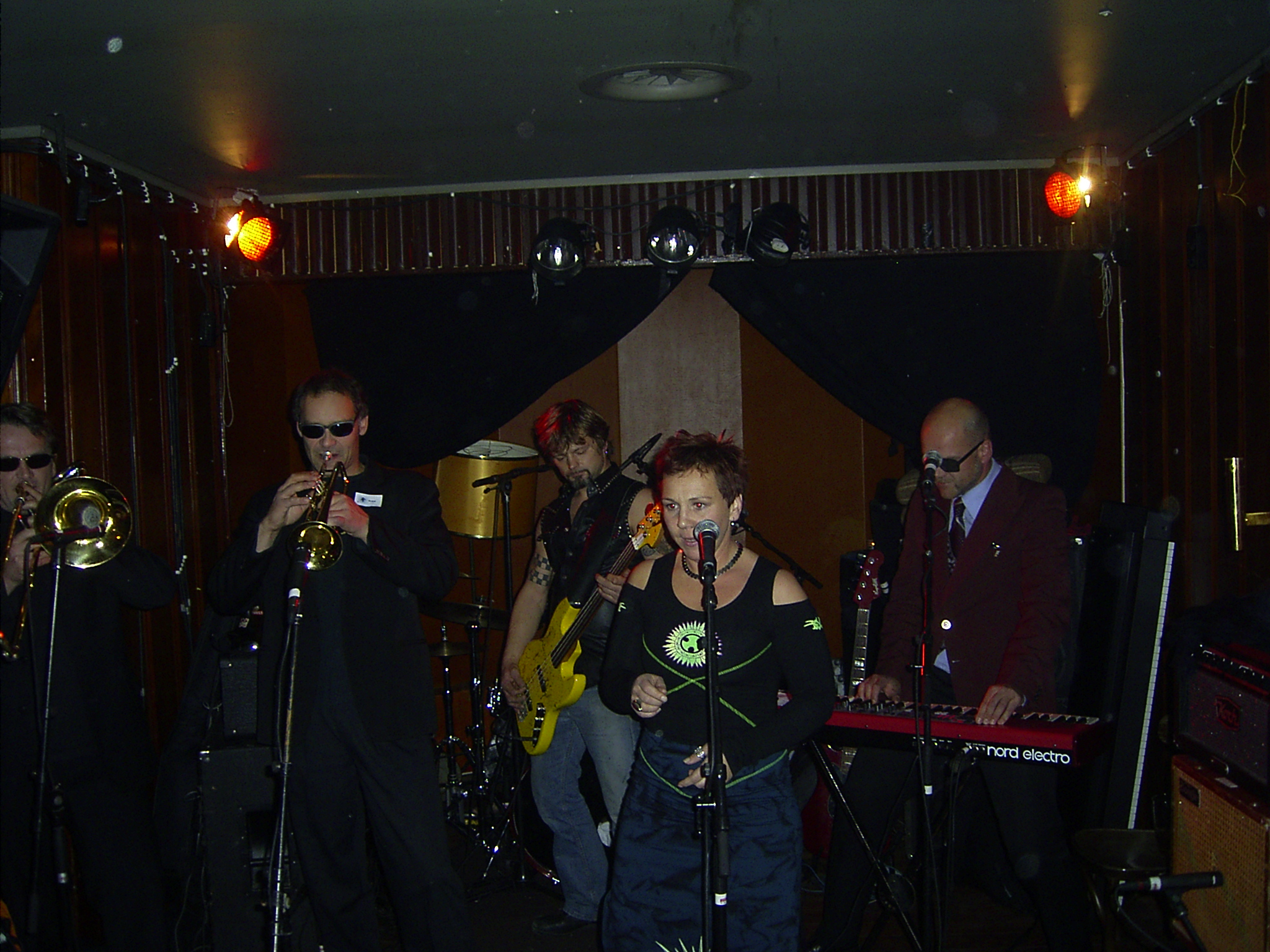 Betty Bohm Bang Band, Gjenforening på Kafé Larsen, Trondheim, 18. oktober 2003. Foto: Bernt Marius Johnsen Betty Bohm Bang Band, Reunion at Kafé Larsen, Trondheim, Norway, October 18. 2003. Photo: Bernt Marius Johnsen